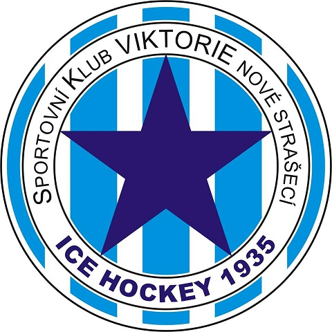 logo